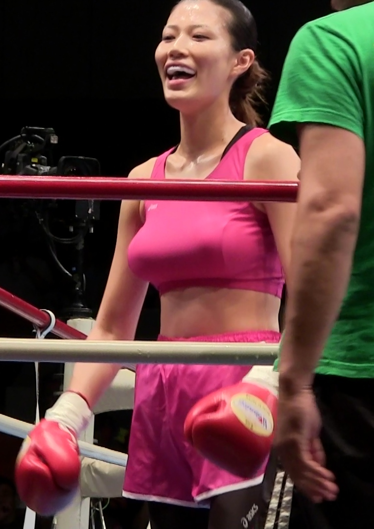 試合前の高野人母美